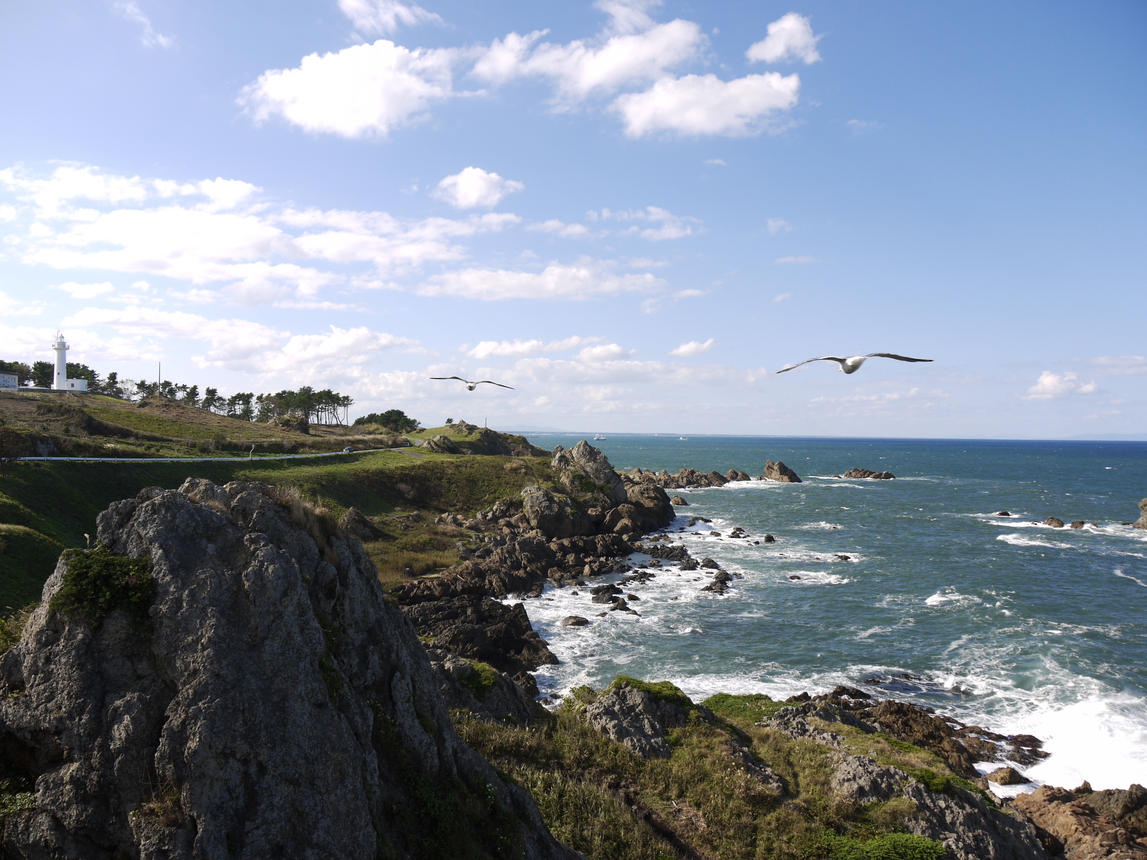 種差海岸 葦毛崎展望台からの眺望